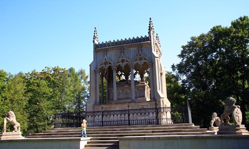 Polska